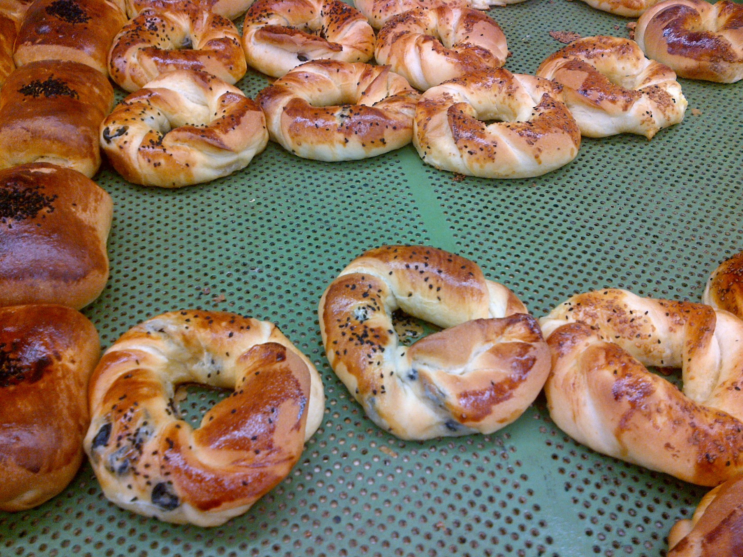 Açma con aceitunas, en un supermercado de Ankara.